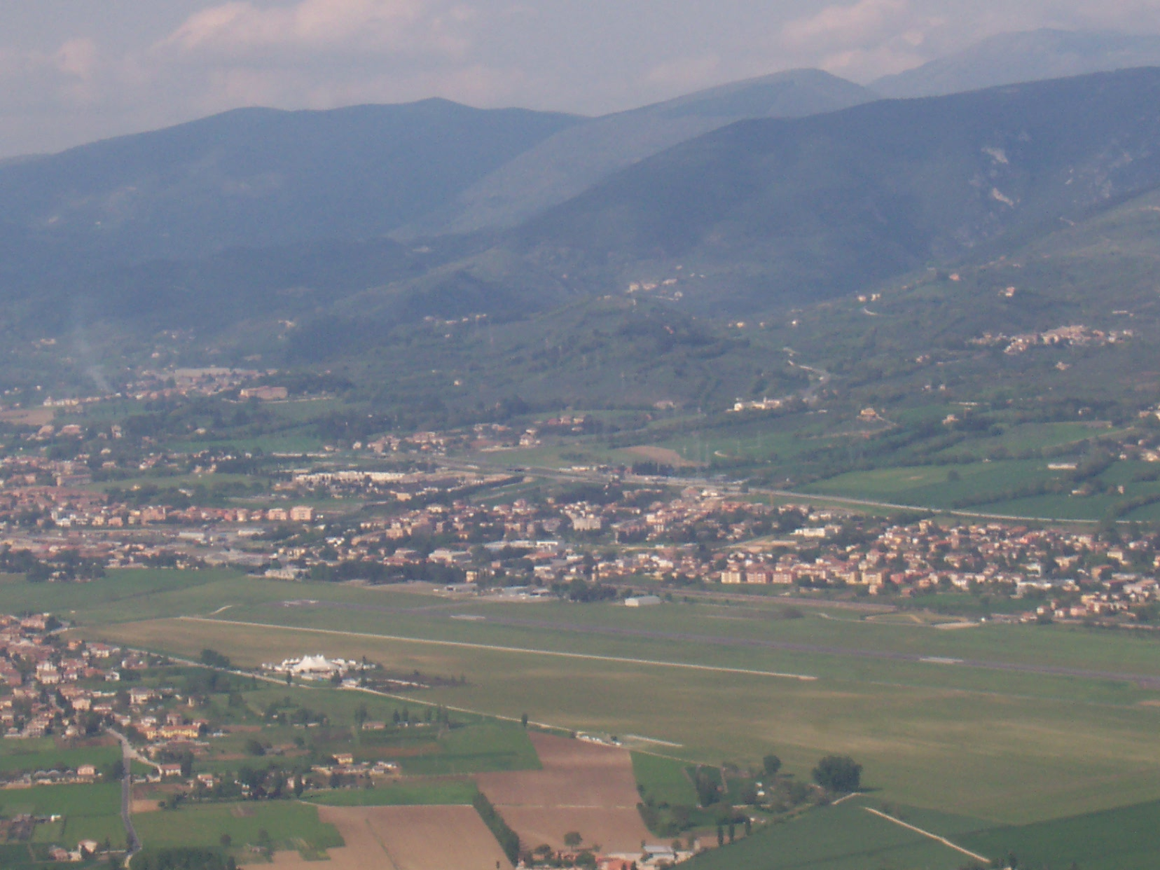 Vista aerea sito aeroporto